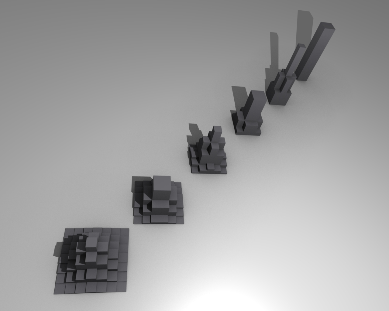 Positions possibles d'un marcheur aléatoire dans un plan en fonction du nombre de pas.